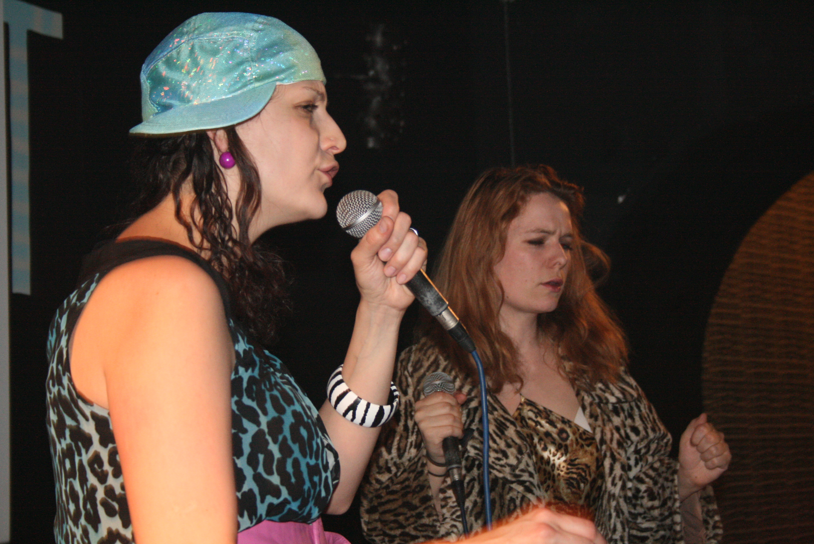 Brno, Rooseveltova 591/11, Club Desert. Vystoupení dvojice Čokovoko na podporu filmového festivalu Mezipatra.